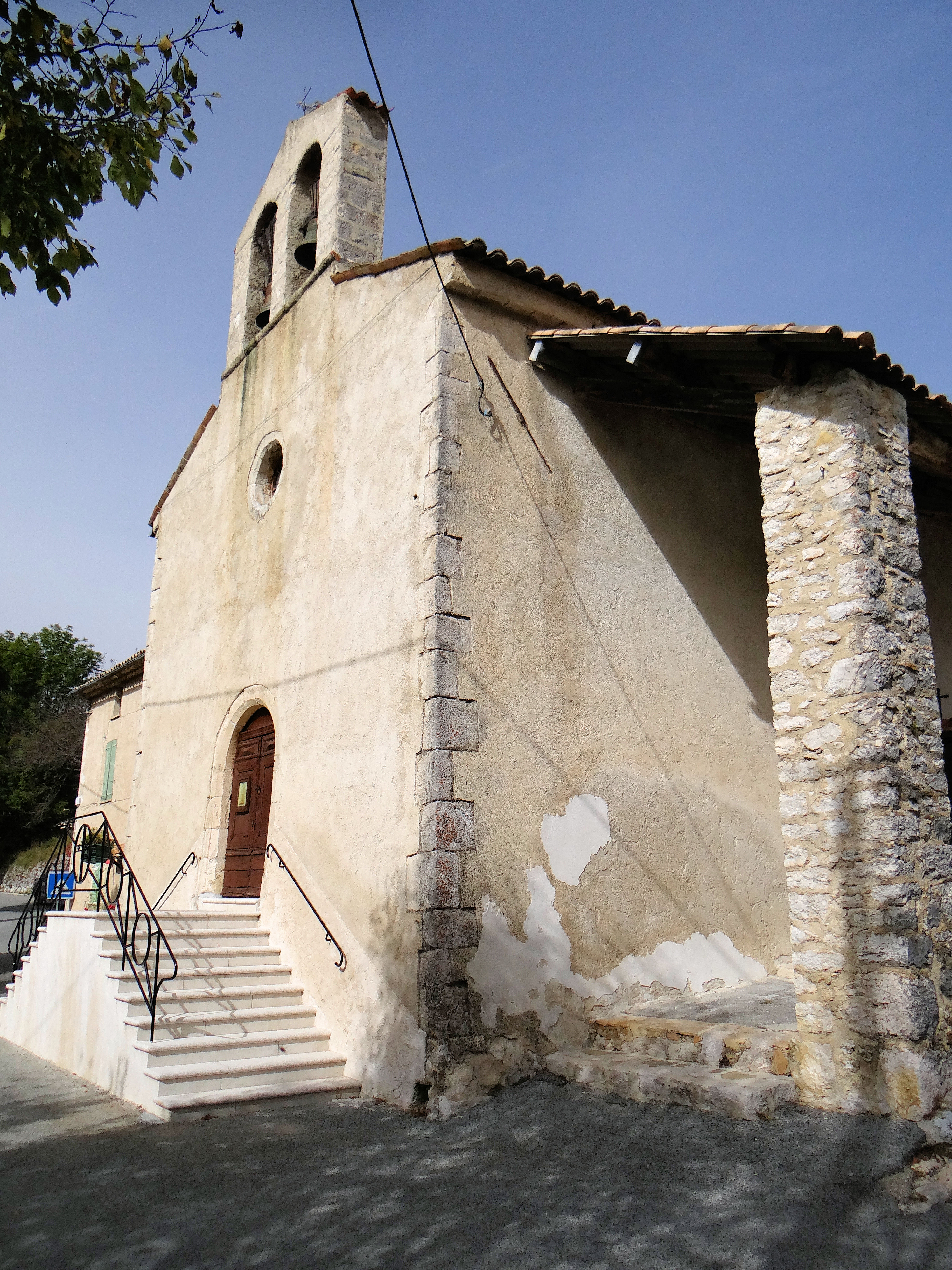 Valderoure - L'église